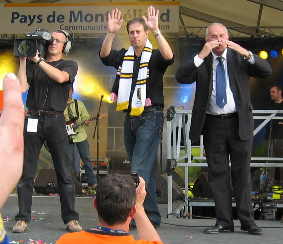 Jean-Claude Plessis, président du FC Sochaux, (à droite), et Alain Perin, entraineur du FC Sochaux, (au centre) vainqueur de la Coupe de France 2007, jour du retour du FC Sochaux du Stade de France à Sochaux